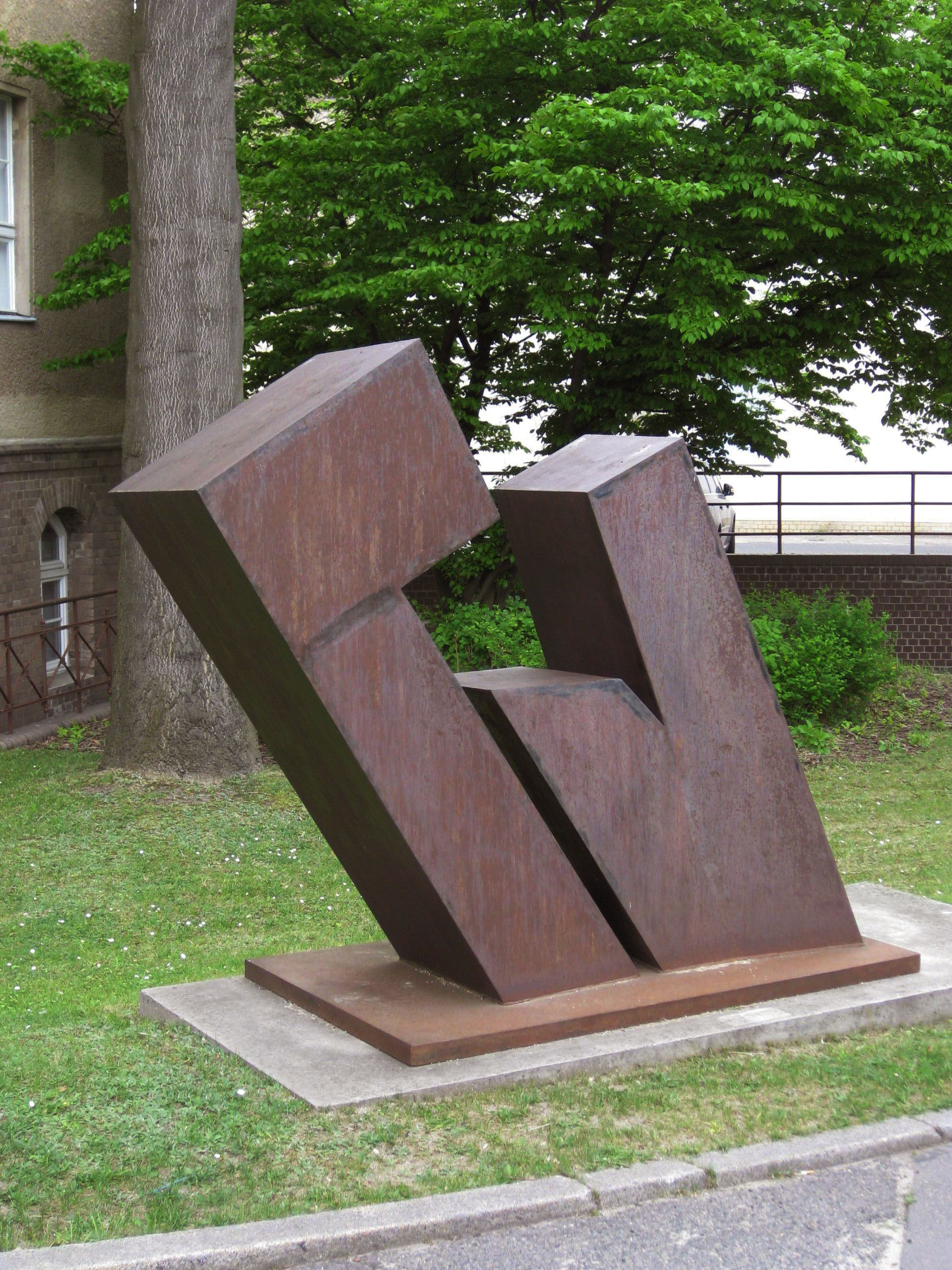 Rüdiger Preisler, Paar, 1996/97, Skulpturengarten AVK, Rubensstr. 125, Berlin (Schöneberg), Deutschland